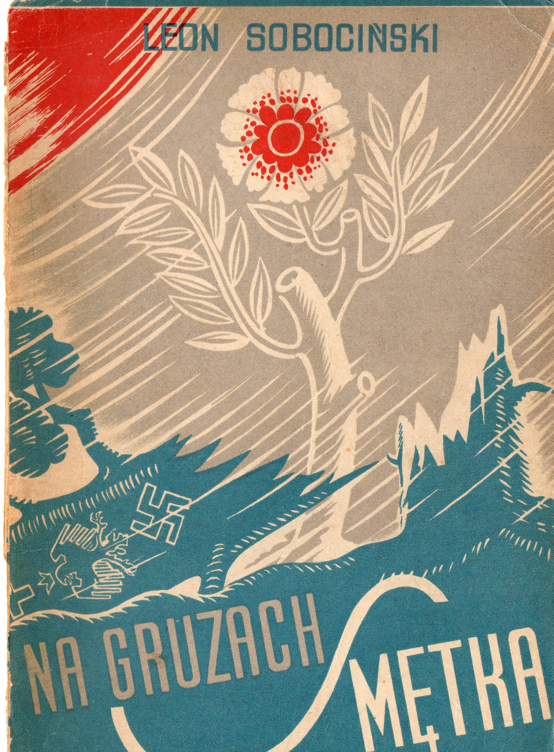 Leon Sobociński, Na gruzach Smętka, wyd. B. Kądziela, Warszawa, 1947 - okładka.